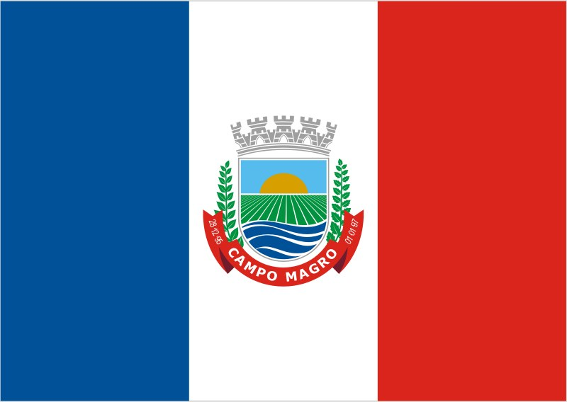 Bandeira do Município de Campo Magro/PR